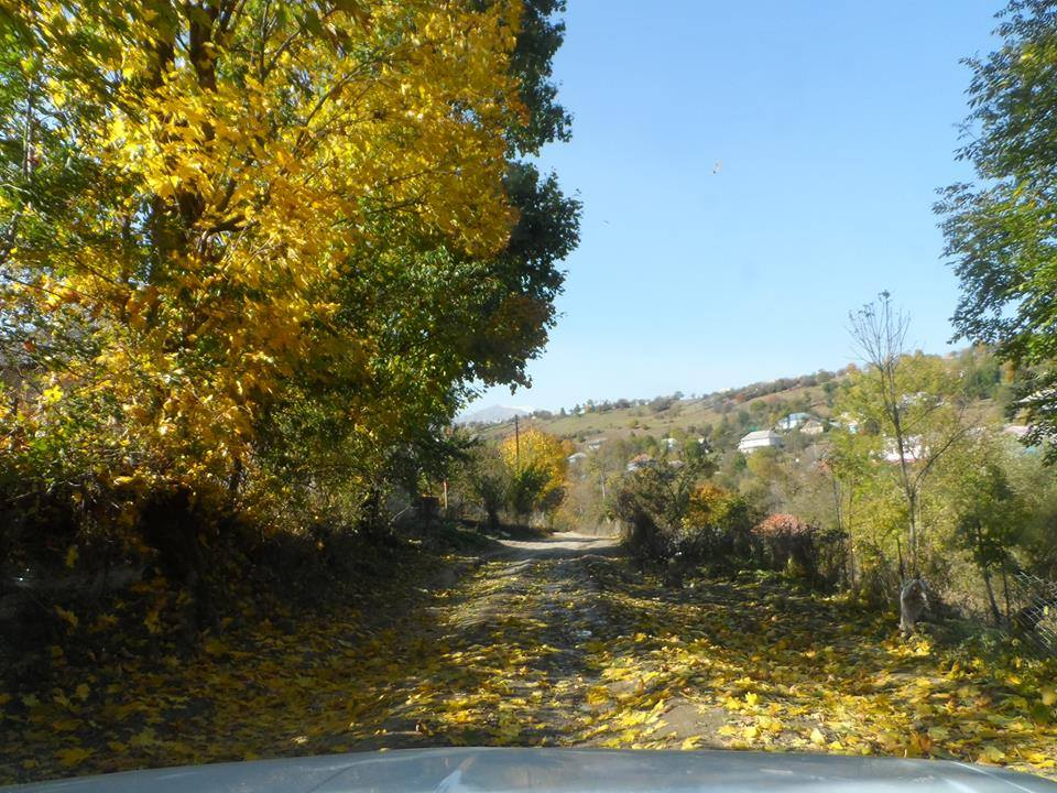 Gədəbəy rayonu Arıqıran kəndi